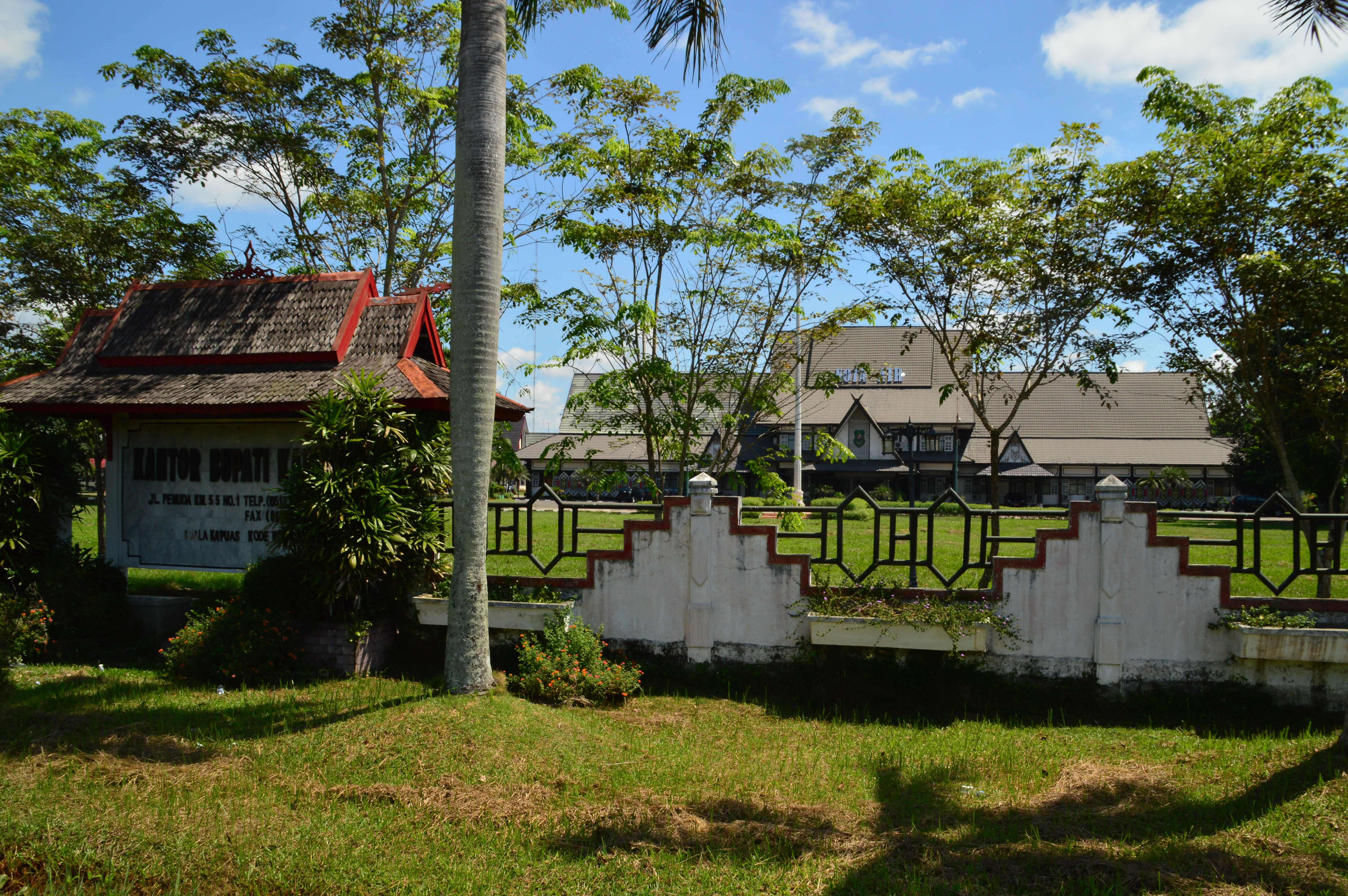 Kantor Bupati Kapuas di kota Kuala Kapuas.